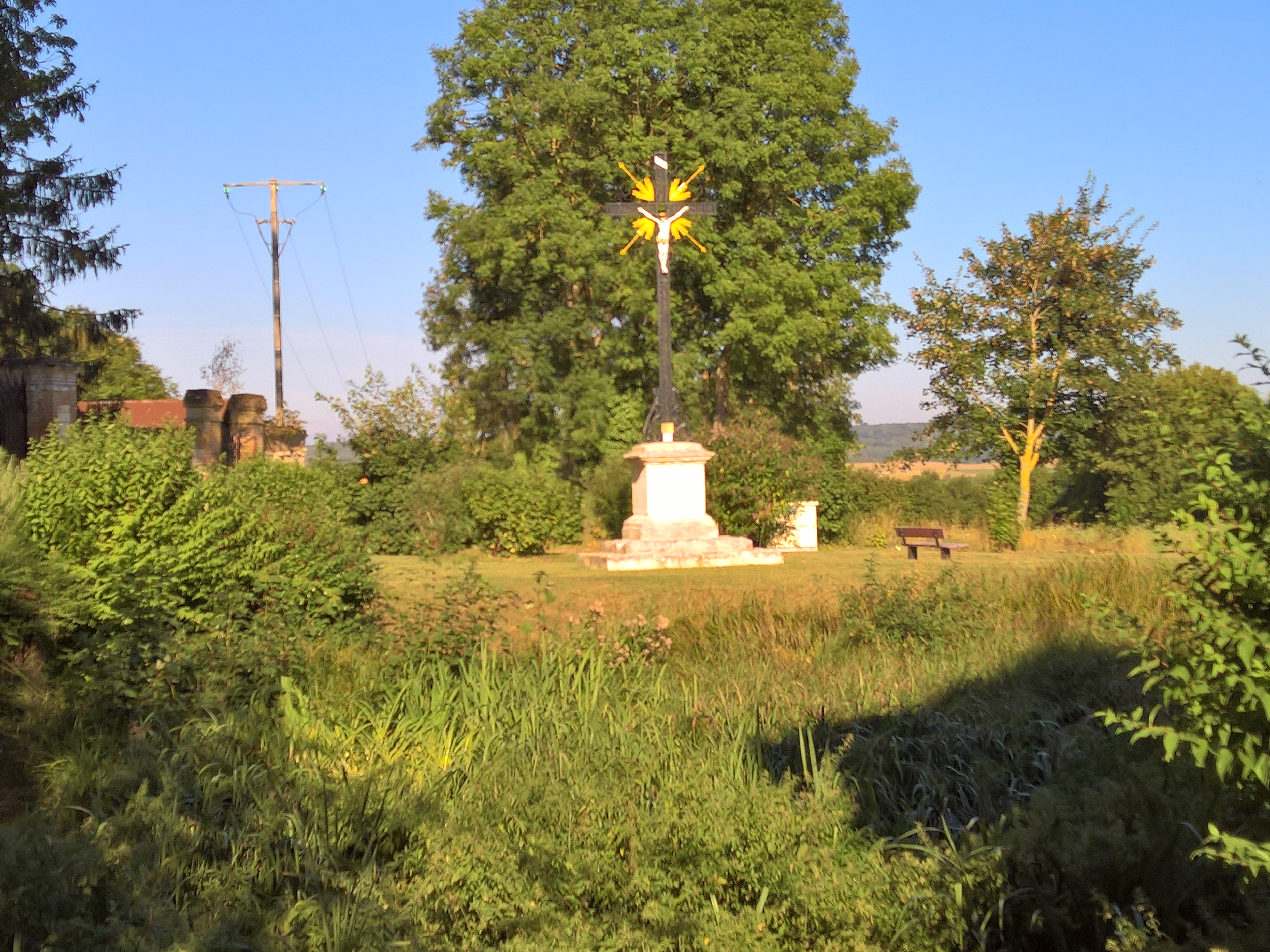 Tilloy-lès-Conty - La mare de la place de l'église et le calvaire